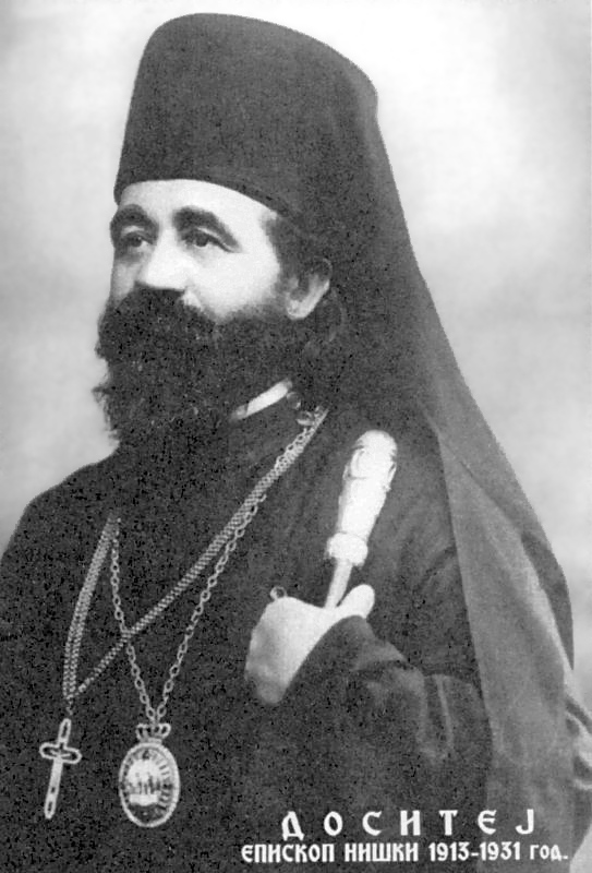 Митропролит Досифей (Васич)